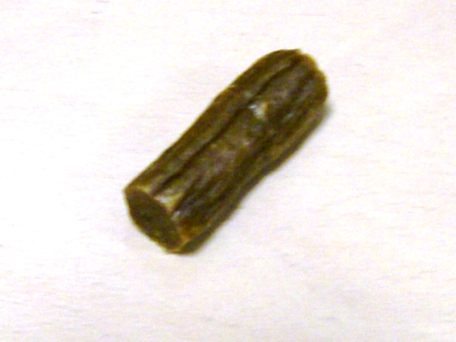 ドライ・ソーセージ。カルパス。 Dry sausage